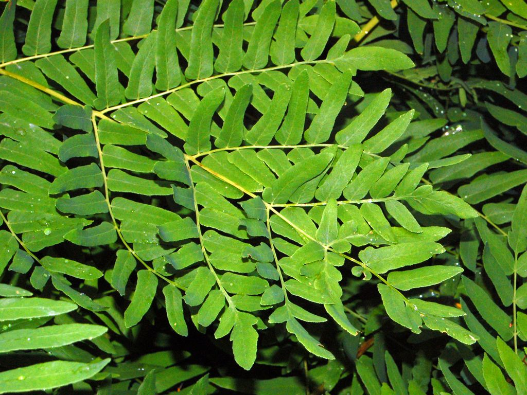 Osmundaceae - Osmunda regalis